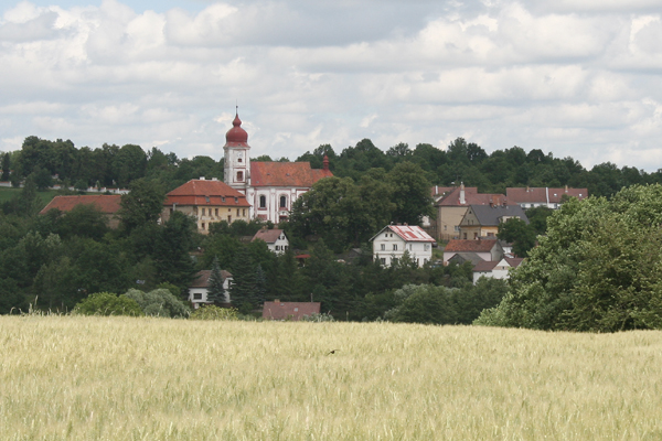 Obec Líšťany v okrese Plzeň-sever, Plzeňský kraj, Česká republika.